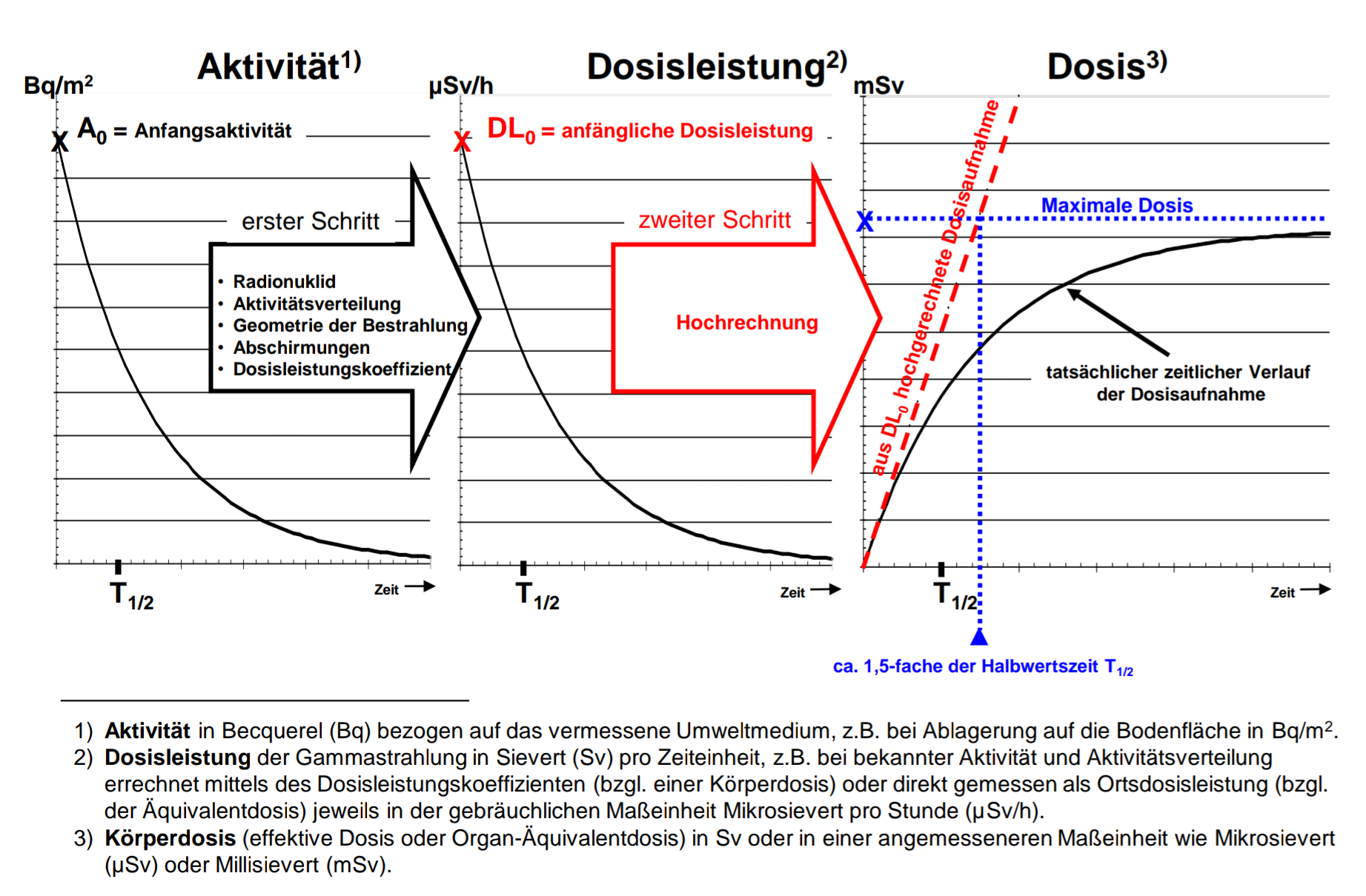 Wirkungskette der externen Bestrahlung durch Bodenkontamination